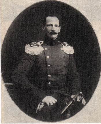 Geen info bij upload door uploader; later aangevuld door BenTels: Foto genomen voor of in 1872. Auteursrecht was toen 50 jaar na dood auteur. Auteursrecht zou gelden als fotograaf overleden in of na (2005 - 50 =) 1955, dus op zijn minst 83 jaar na nemen foto. Niet verlopen zijn van auteursrecht op deze foto is zeer onwaarschijnlijk. Ergo: Bild:Albrecht-v-Preussen.JPG Grafika:Albrecht-v-Preussen.JPG